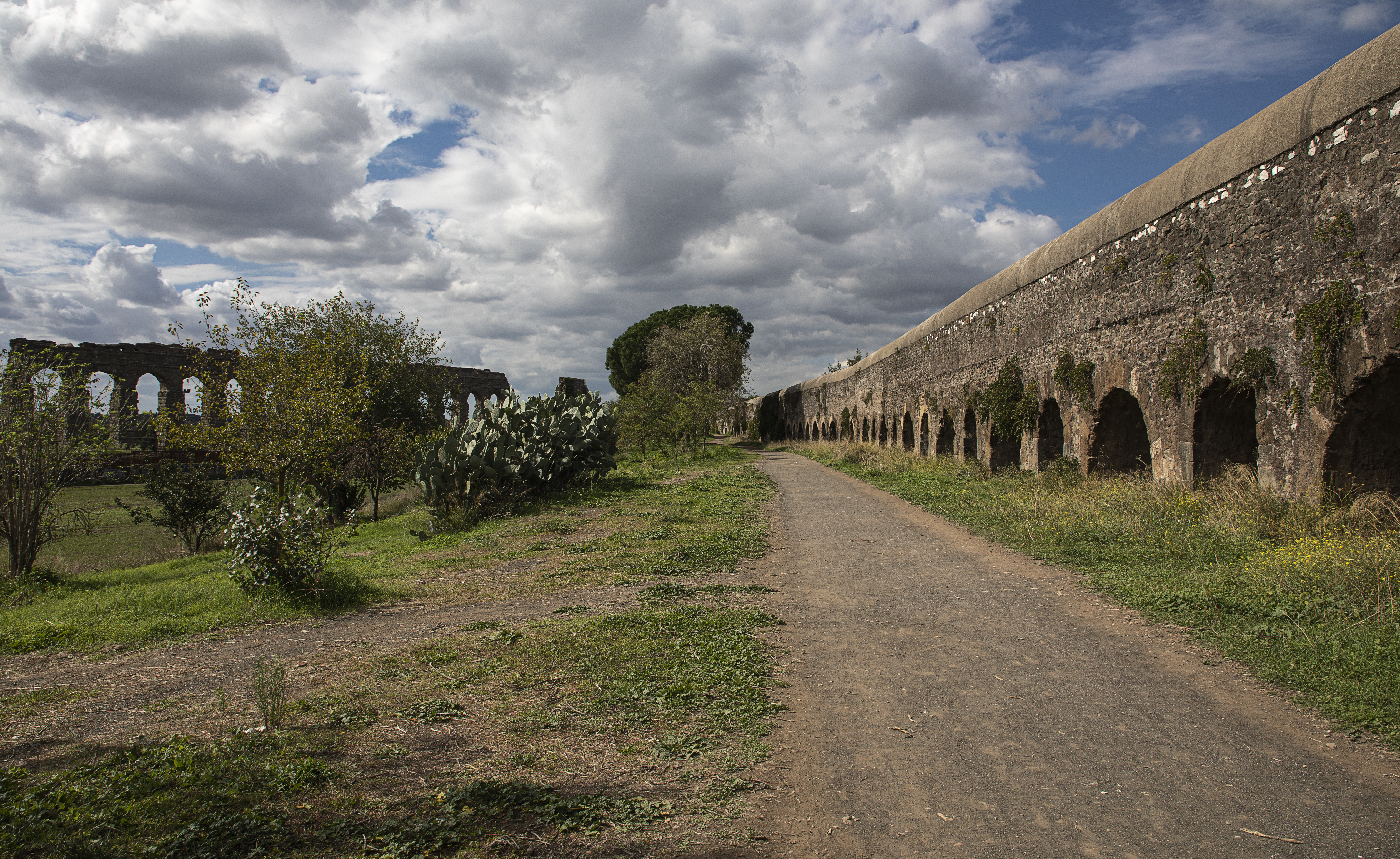 parco degli Acquedotti This is a photo of a monument which is part of cultural heritage of Italy.